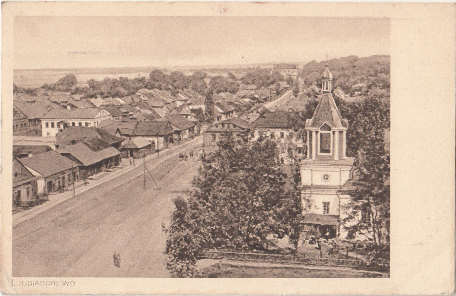 Беларуская (тарашкевіца): Любяшоў (Lubiašoŭ), рог пляцу Рынку (plac Rynak) і вуліцы Замкавай (vulica Zamkavaja). Царква-мураўёўка